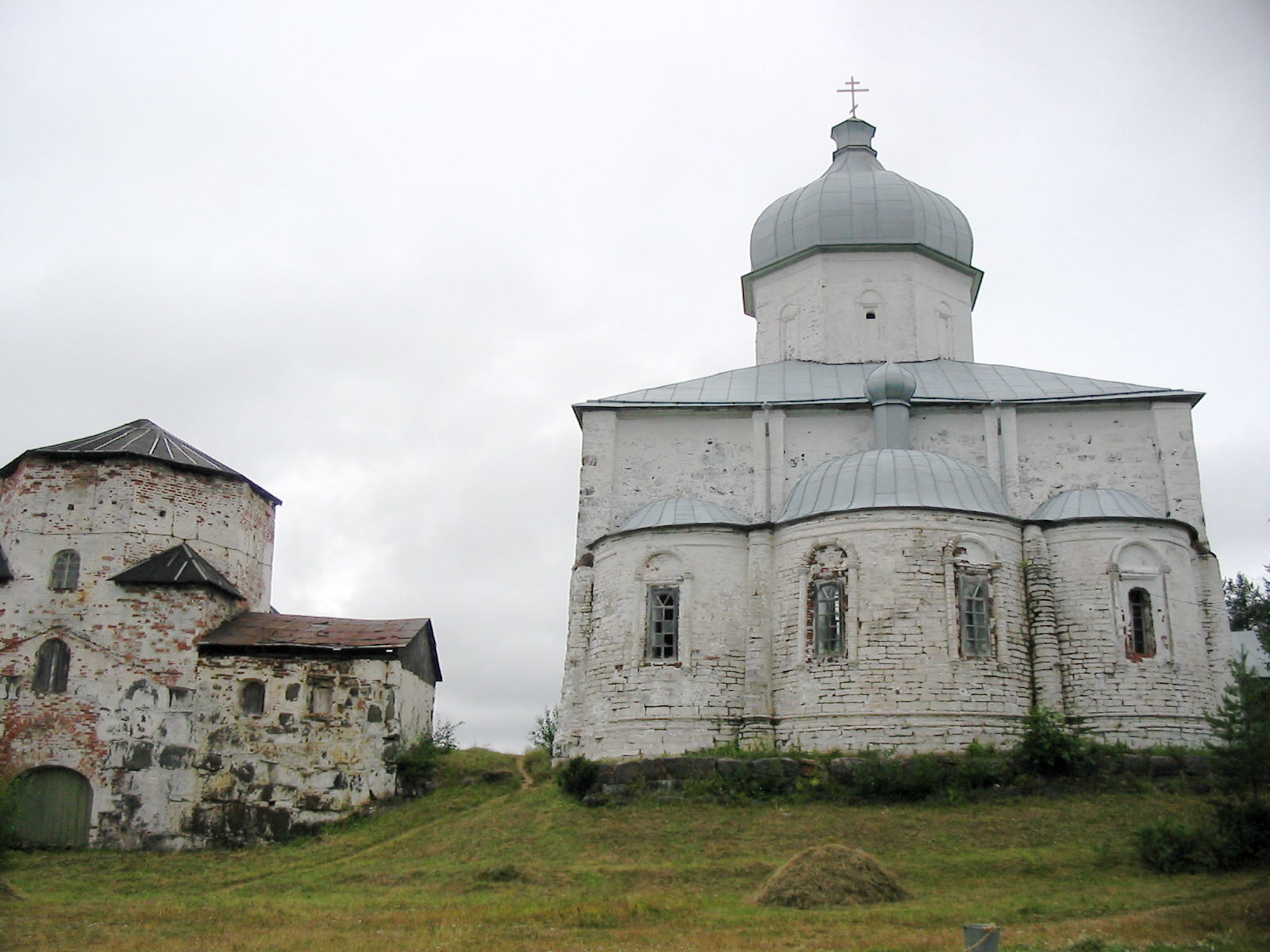 Kiy-island (Кий-остров), White Sea, Russia Onega Monastery of the Cross (Онежский Крестный Монастырь) (1660) July-August 2006